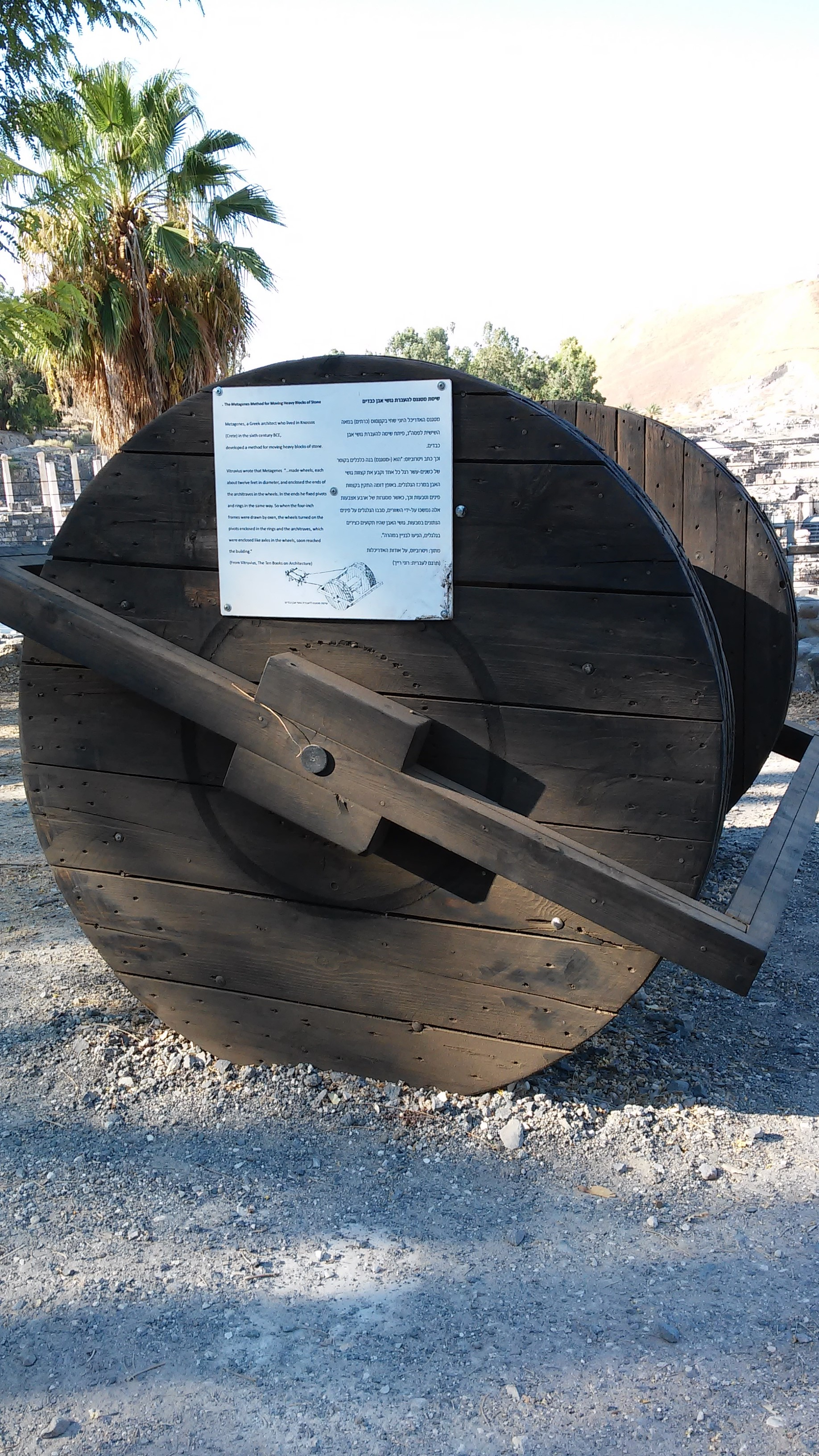 מבט צידי על דגם משוחזר של שיטת מטגנס להעברת אבנים כבדות. בית שאן העתיקה, סקיתופוליס